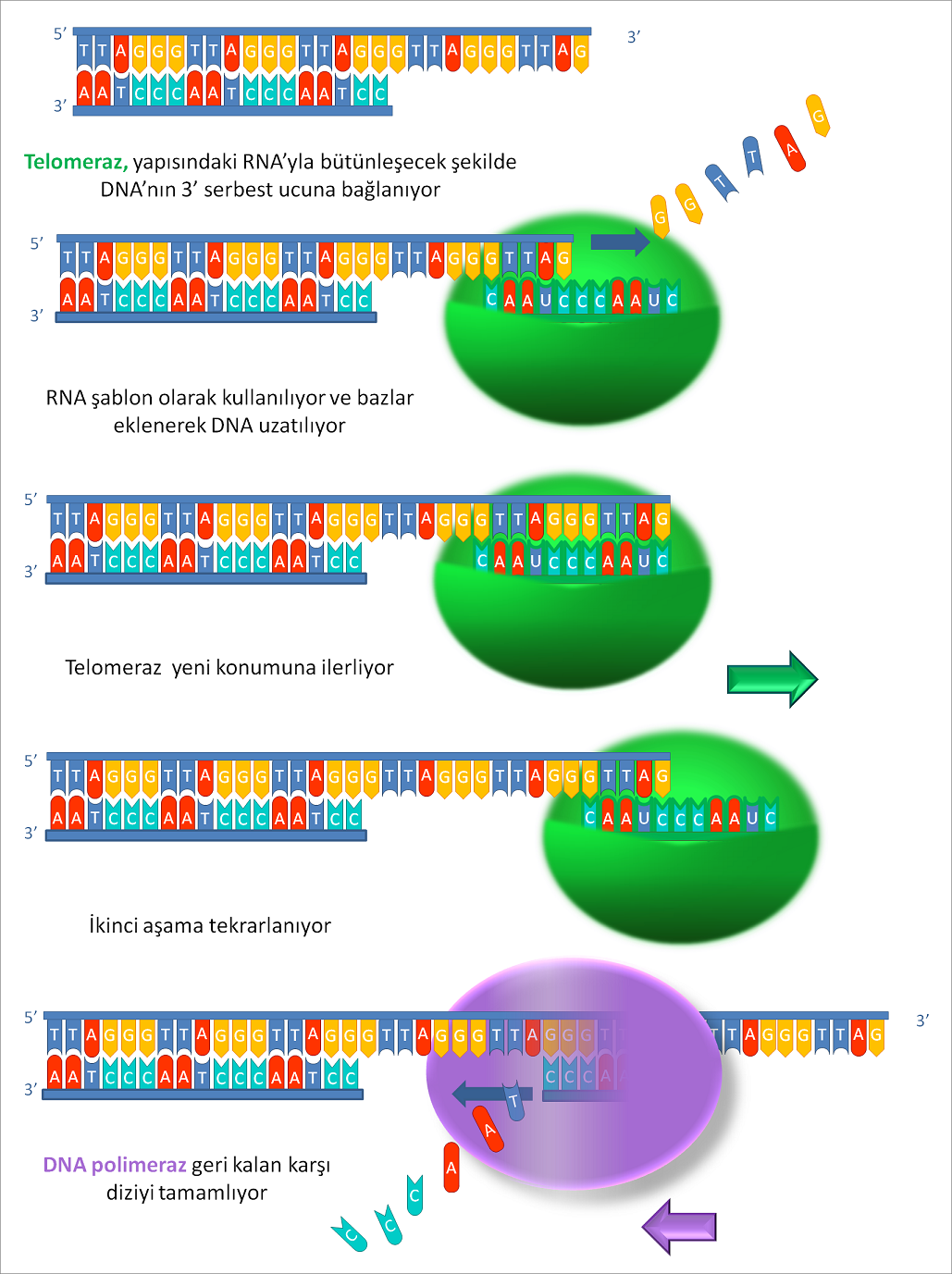 Telomeraz'in calisma mekanizmasinin asamali olarak gosterimi.